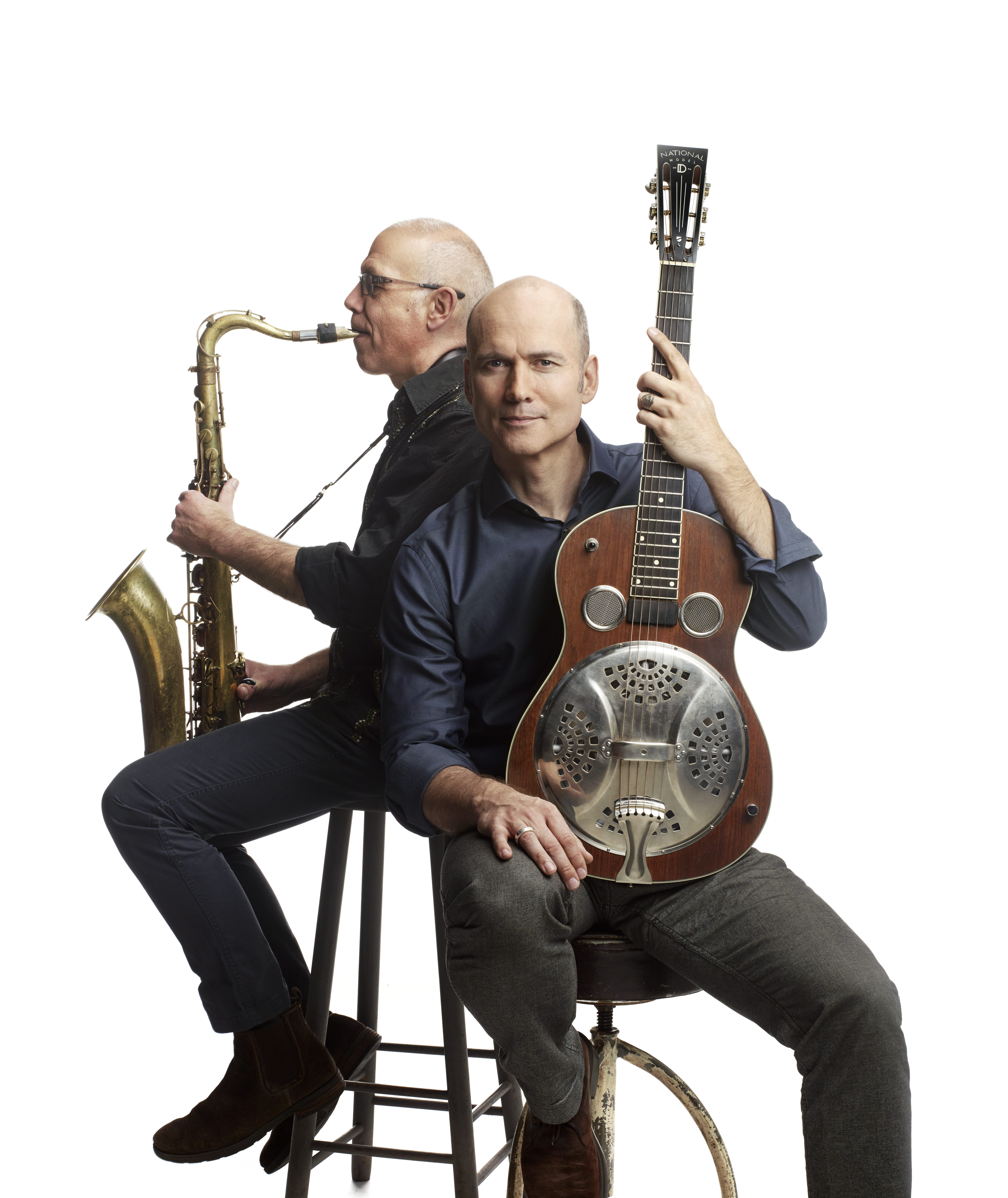 Bernd Winterschladen (Sax) und Oliver Steller (Voc, Git) 2016